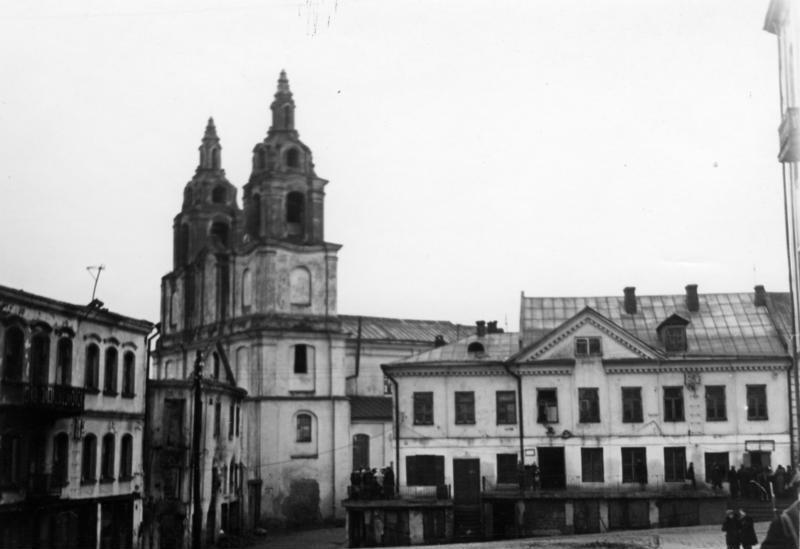 Information added by Wikimedia users.Беларуская (тарашкевіца): Ракурс на касьцёл (цяпер — Сьвята-духаў катэдральны сабор). Менск, Беларусь. 1941 год.